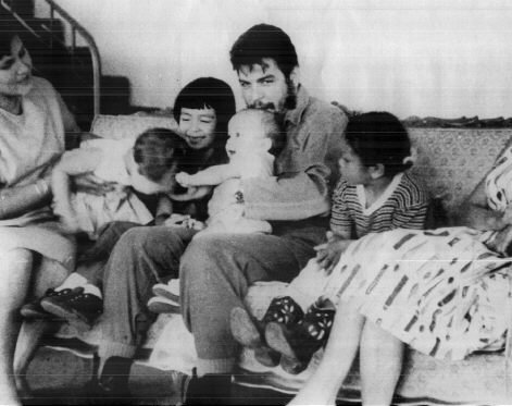 Che Guevara y familia. De izquierda a derecha: Aleida March, Camilo (h), Hilda (h), Che con Celia (h) en brazos, Aleida (h)